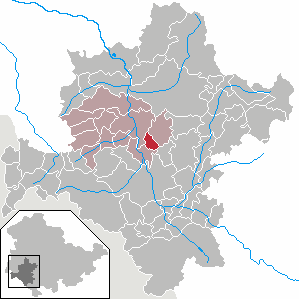 Wallbach in Thuringia - District Schmalkalden-Meiningen